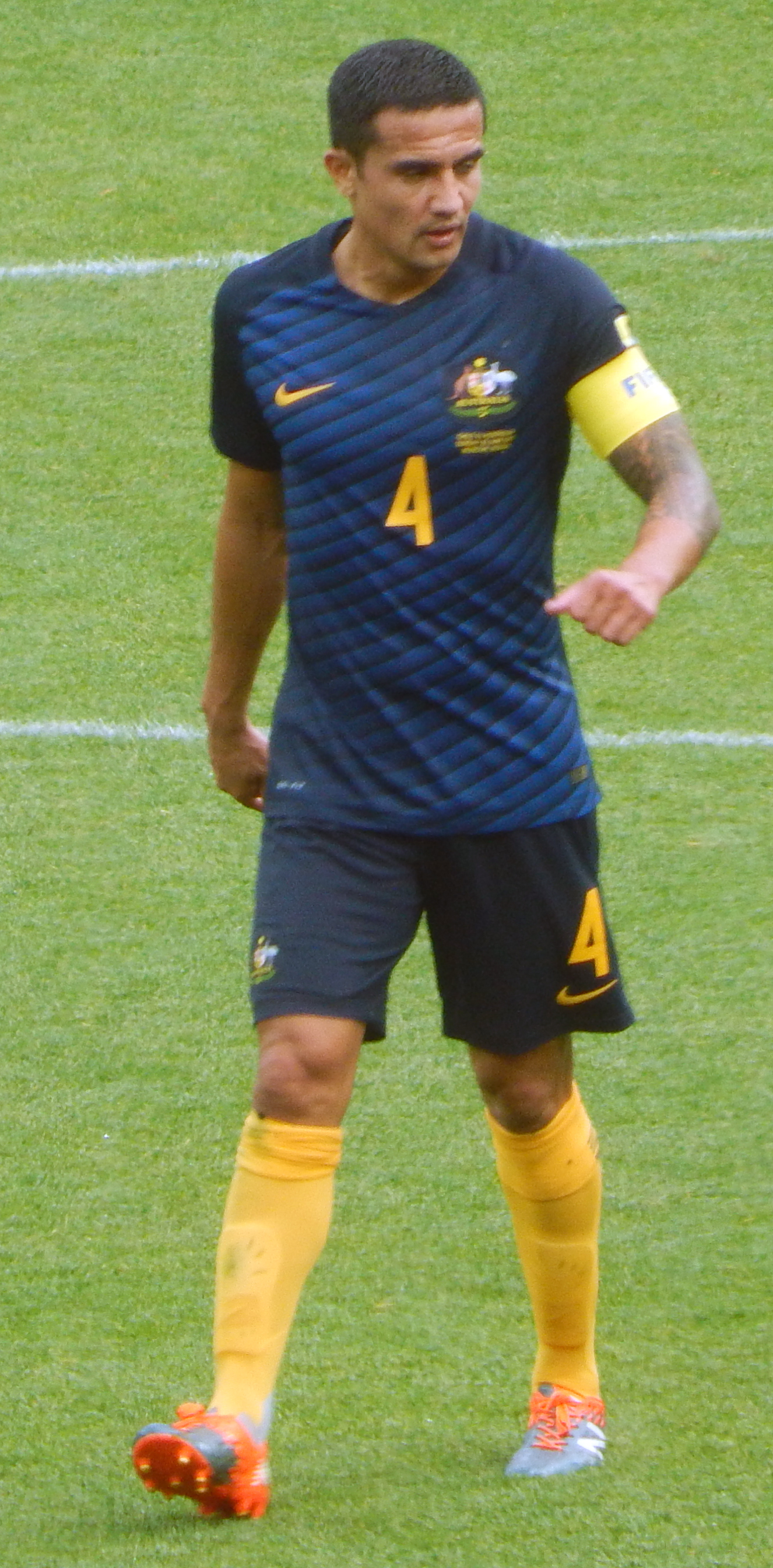 Матч Чили – Австралия